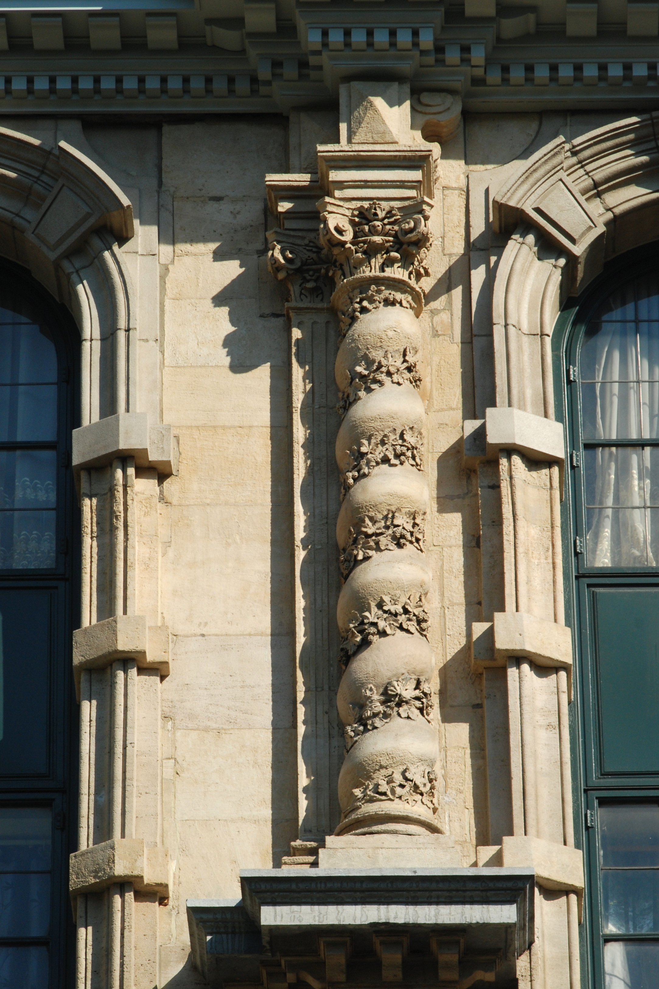 Belgique - Bruxelles - Maison presbytérale de l'église Notre-Dame du Finistère